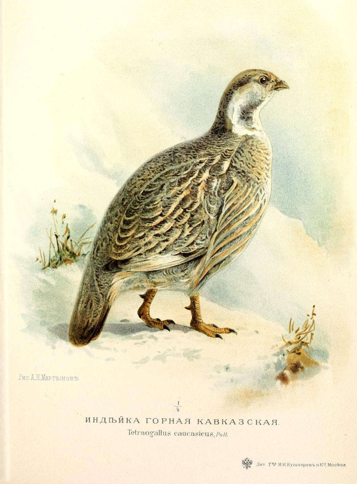 Кавказский улар, Мензбир М.А. Охотничьи и промысловыя птицы Европейской России и Кавказа. 2 тома и атлас. М., типо-литография Т-ва И. Н. Кушнерев и Ко., 1900-1902.